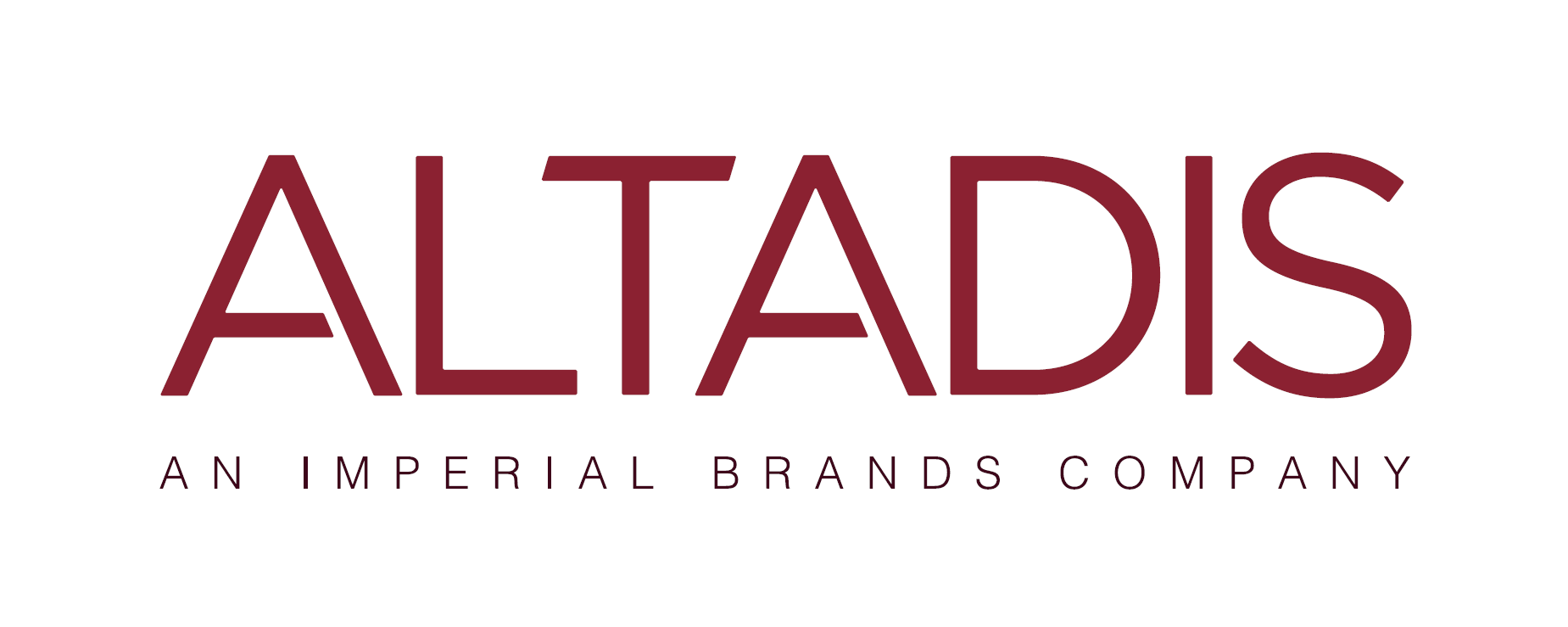 Logotipo de Altadis